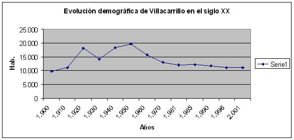 Evolucion de la poblacion en el municipio de villacarrillo durante el siglo XX